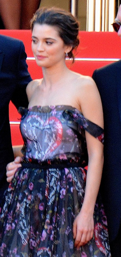 Joana Ribeiro au festival de Cannes